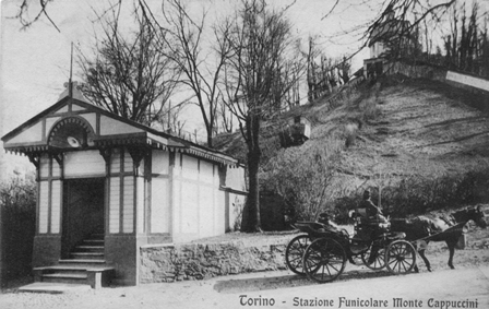 Funicolare del monte dei Cappuccini